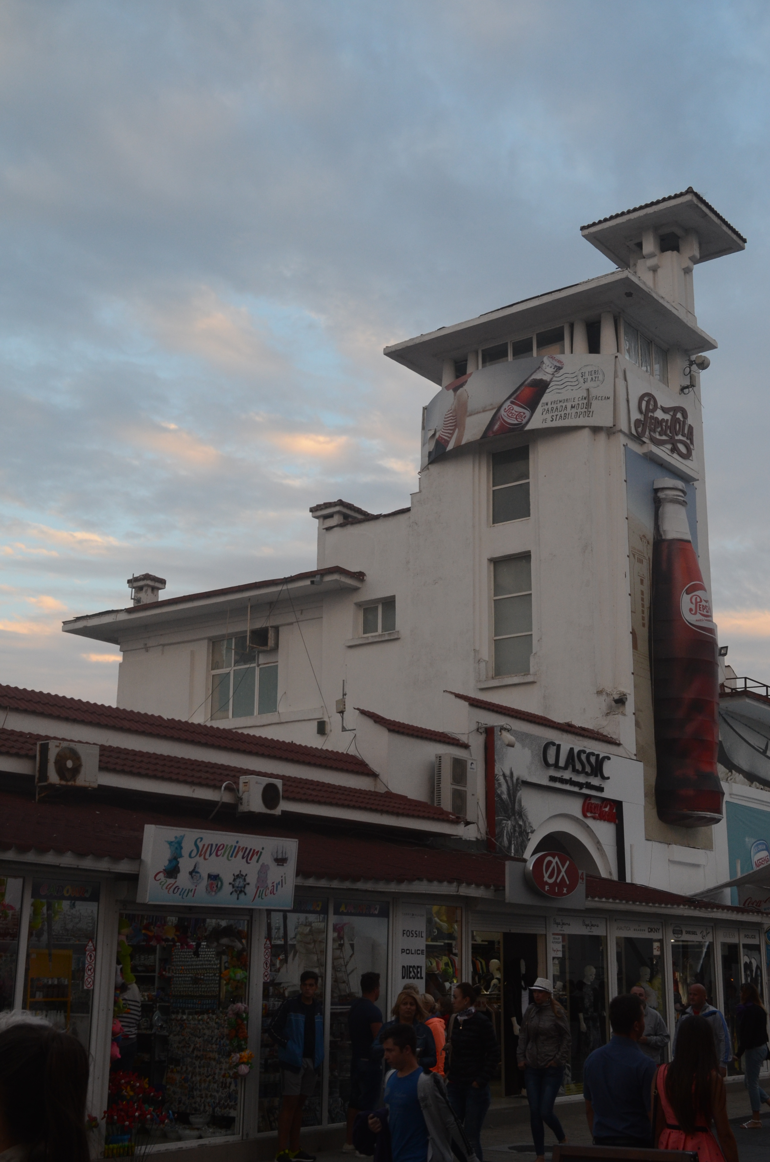 Cazinoul din Mamaia 01